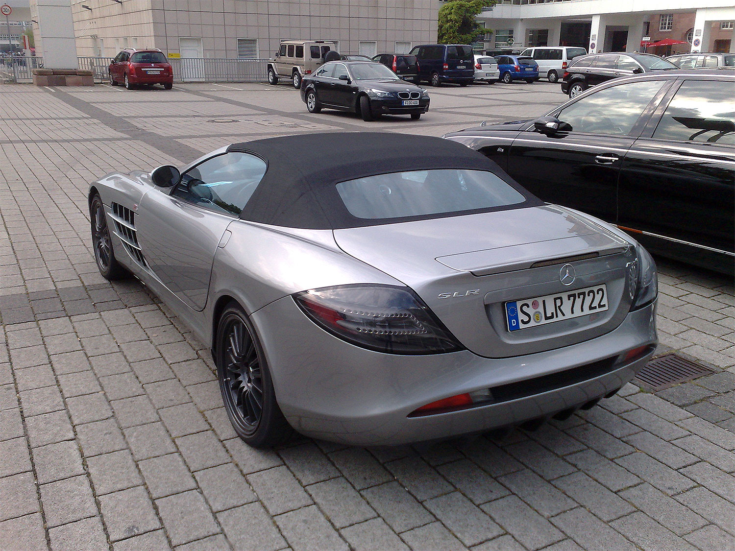 Mercedes-Benz SLR McLaren 722S